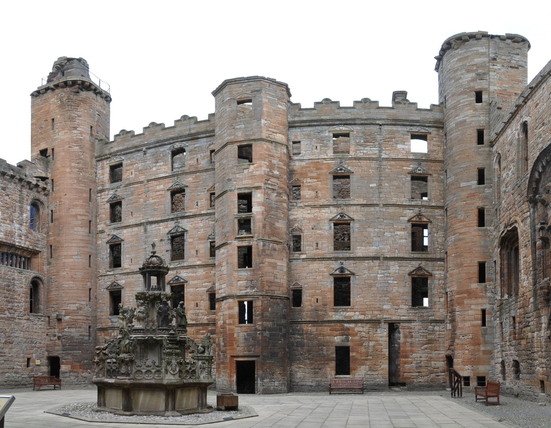 Hoffassade des Nordflügels von Linlithgow Palace This image was created with Hugin